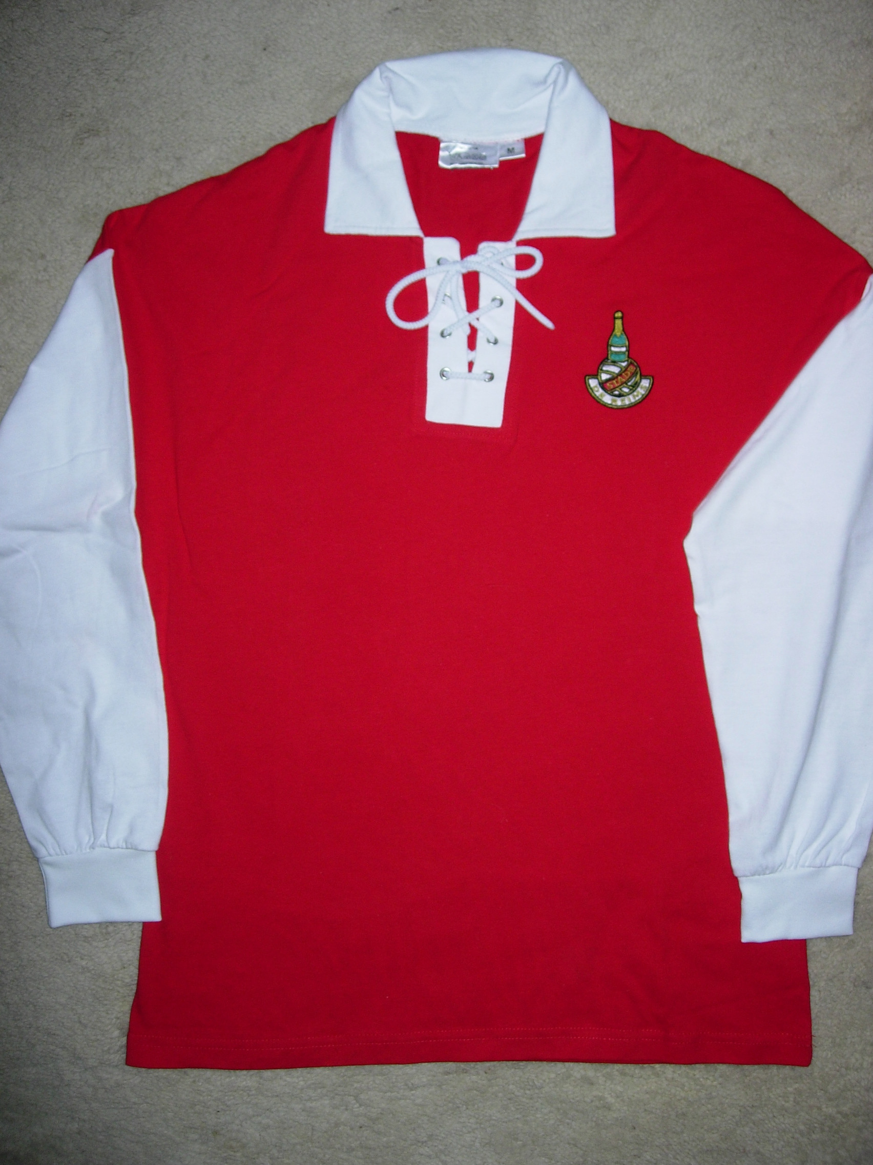 Historisches Trikot von Stade de Reims (1950er Jahre)